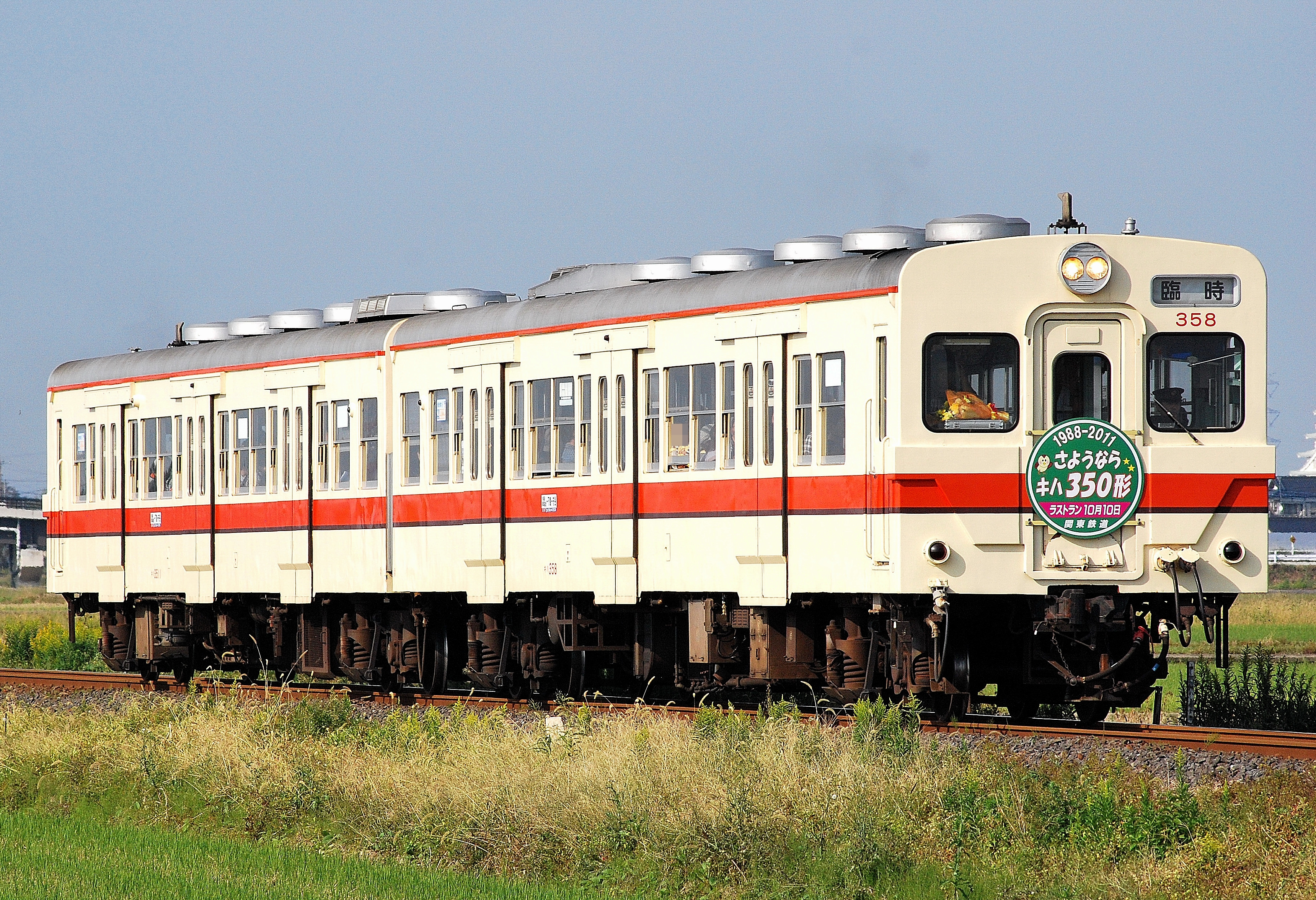 関東鉄道キハ350形、キハ358＋キハ3511さよなら運転。（公道から撮影）